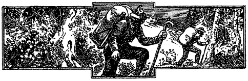 Erzgebirgische Dorfgeschichten